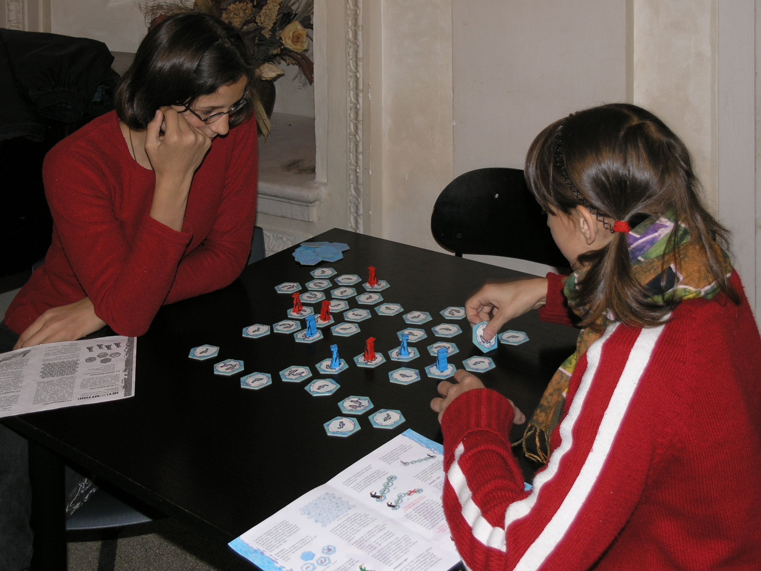 Deskohraní 2008 - volné hraní, Hej! To je moje ryba!